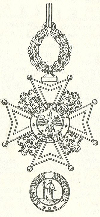 Voor-en achterzijde van de Orde van de Adelaar van Este (Hertogdom Modena 1855) Front and back of the Order of the Eagle of Este Duchy of Modena 1855